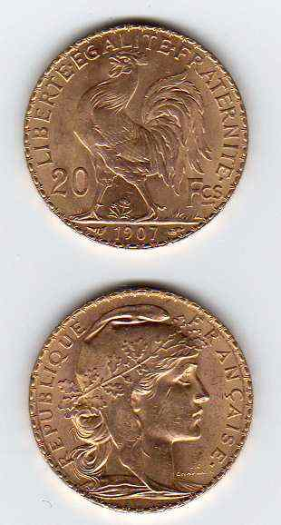 Pièce 20 Francs Français en Or